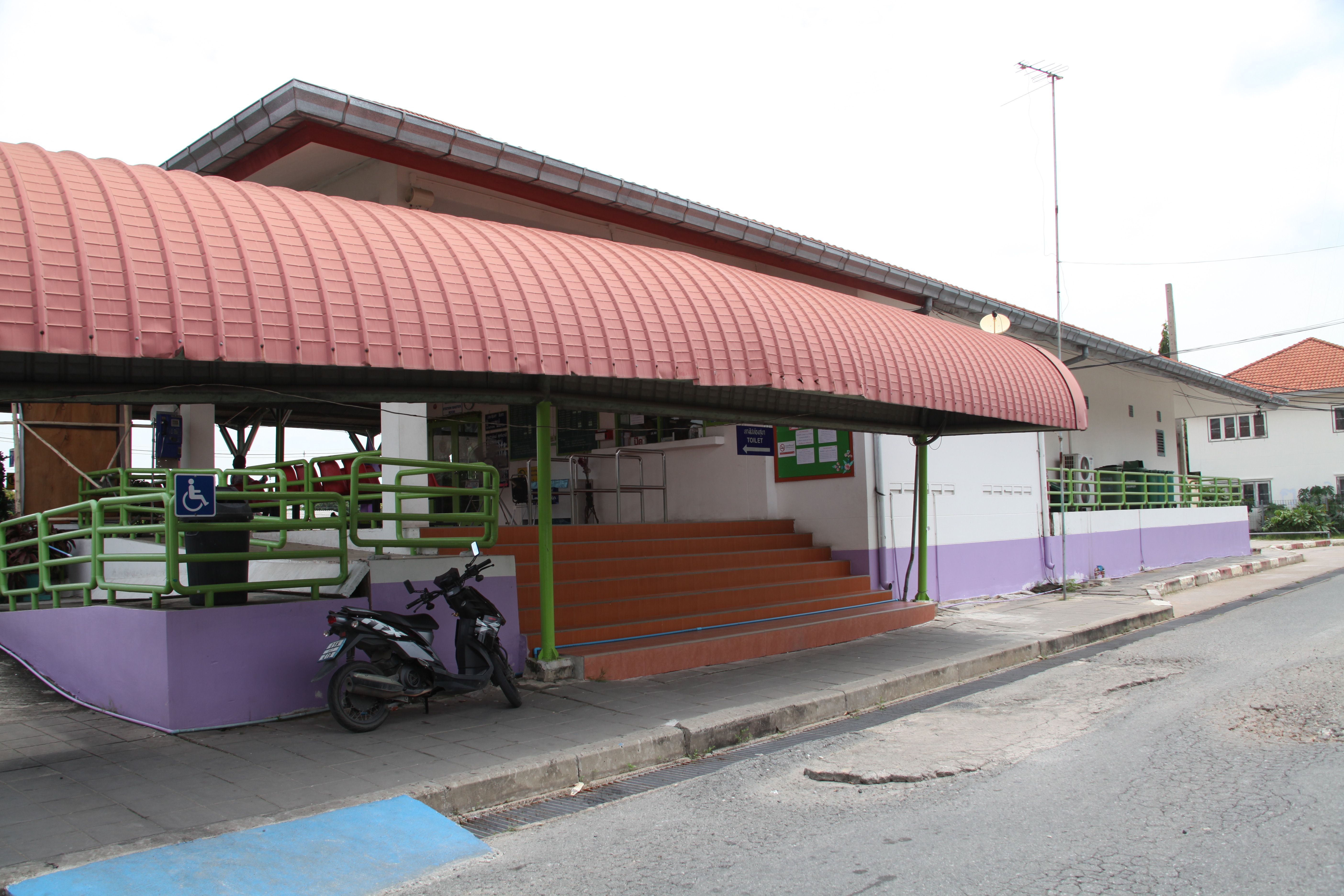 フアタケー駅正面入口